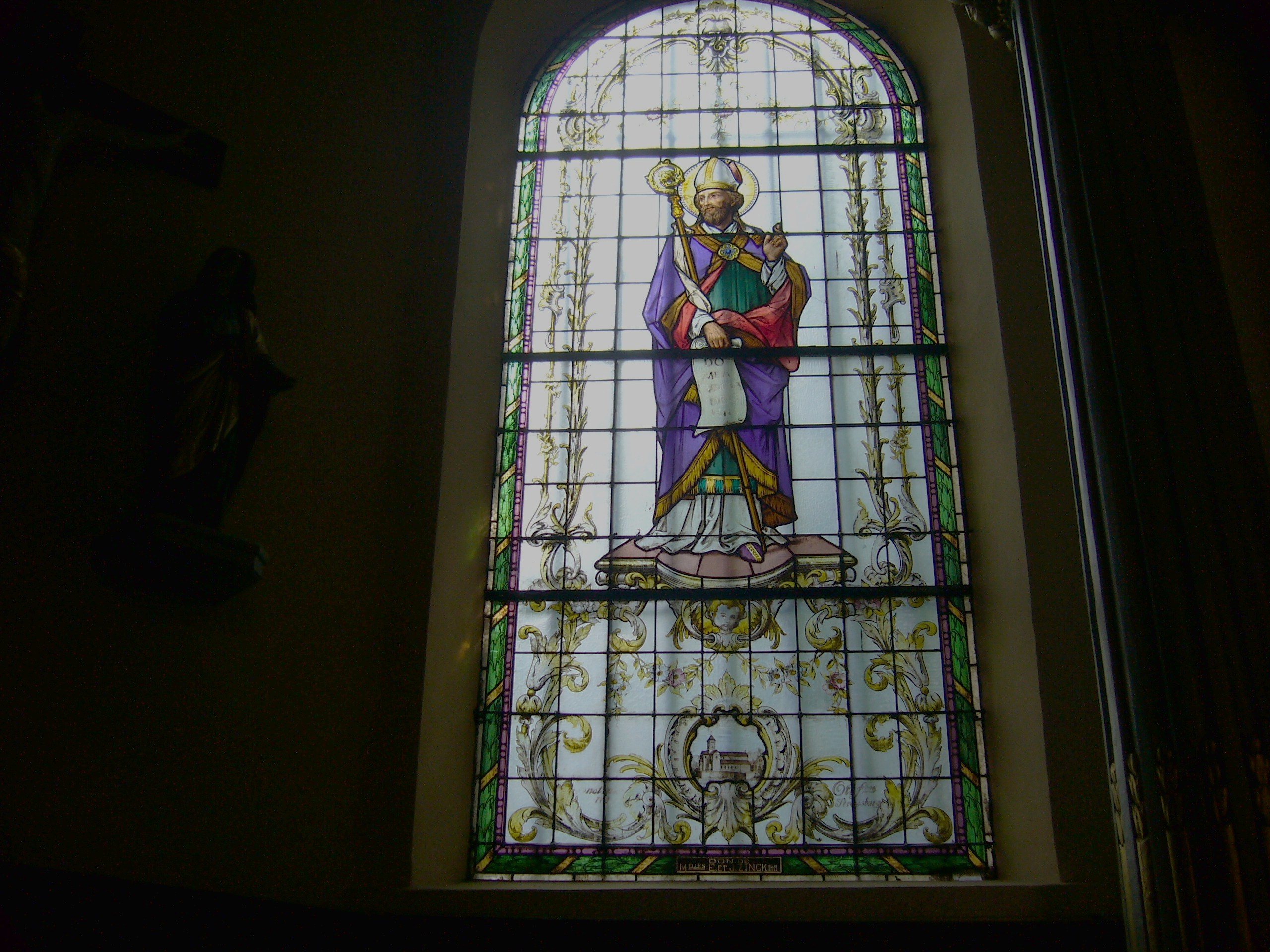 Liepvre 015.JPG